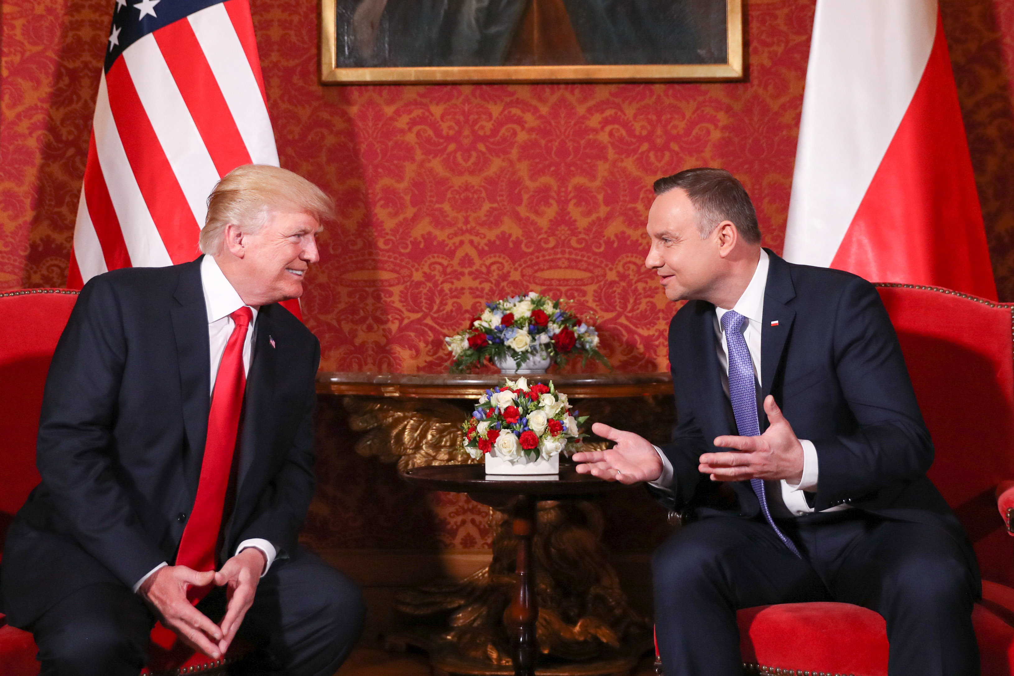 06/07/2017 Prezydenci Andrzej Duda i Donald Trump na Zamku Królewskim w Warszawie. Fot. Krzysztof Sitkowski